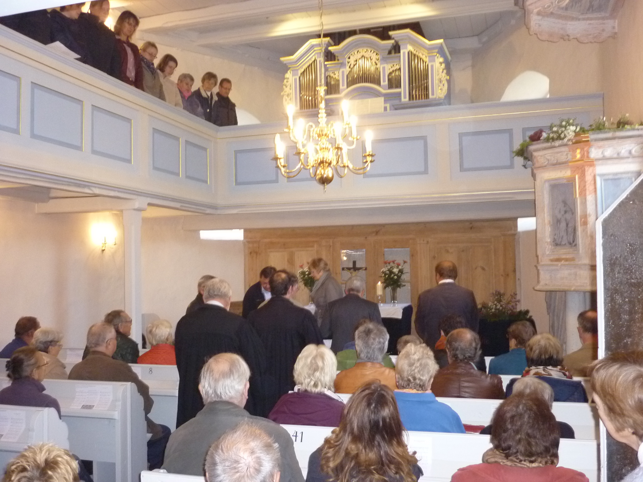 Inneres der Kirche Kleinlöbichau beim Gottesdienst zur Wiedereinweihung am 31. Oktober 2015